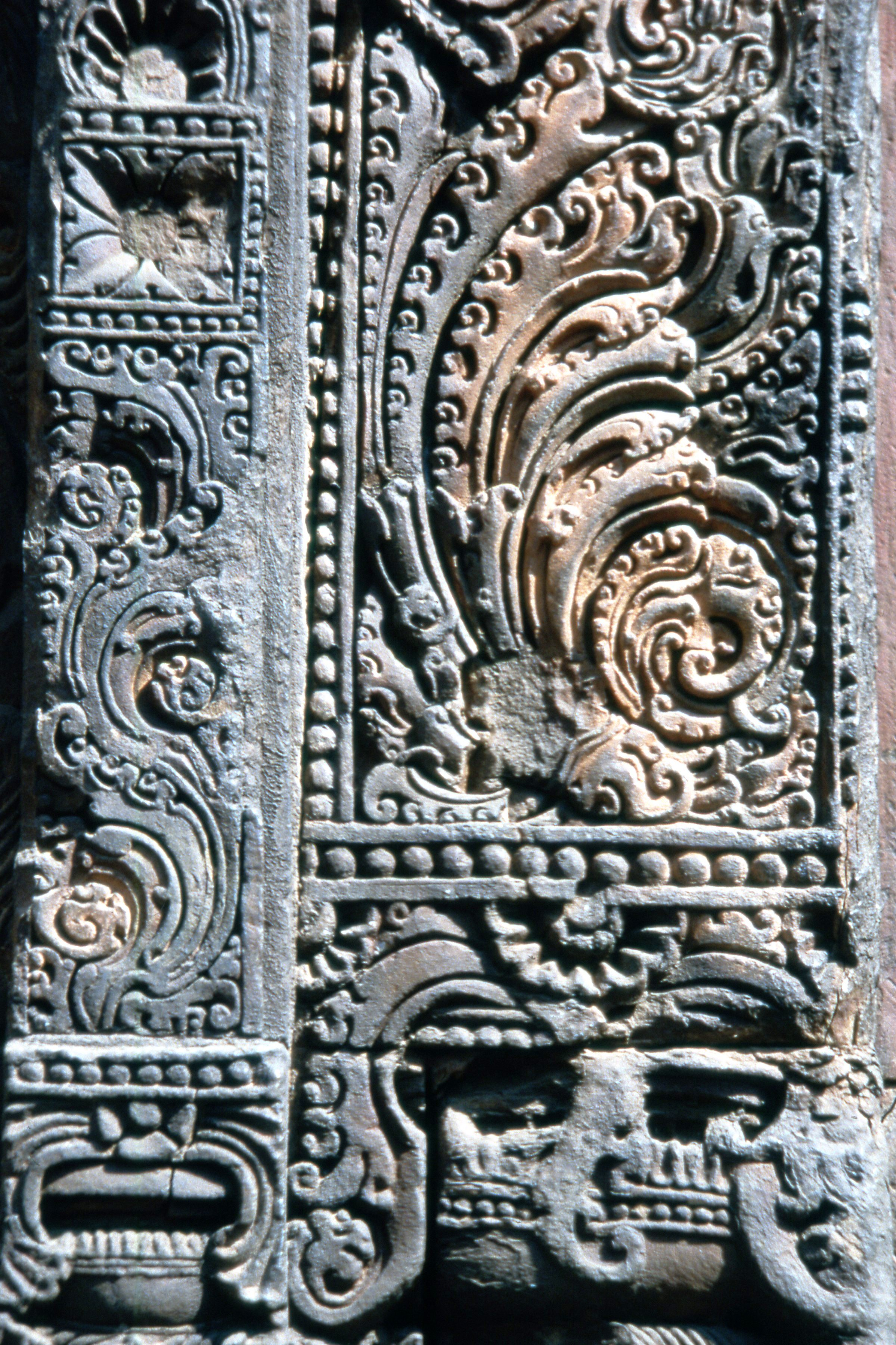 Siglo VIII,Templo Vaital Deul/Baitala Deula,arquitectura Kalinga, Detalle de relieve en un costado del templo con el simbolo de la Purna Kalasha rodeada por guirnaldas. Orissa,Bhuvanesvar,India.